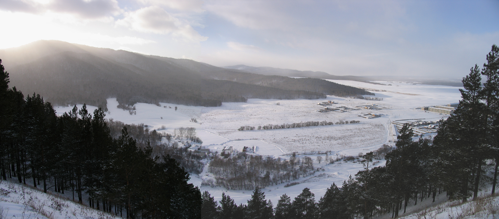 Хамар-Дабан в районе поселка Каменск, Бурятия